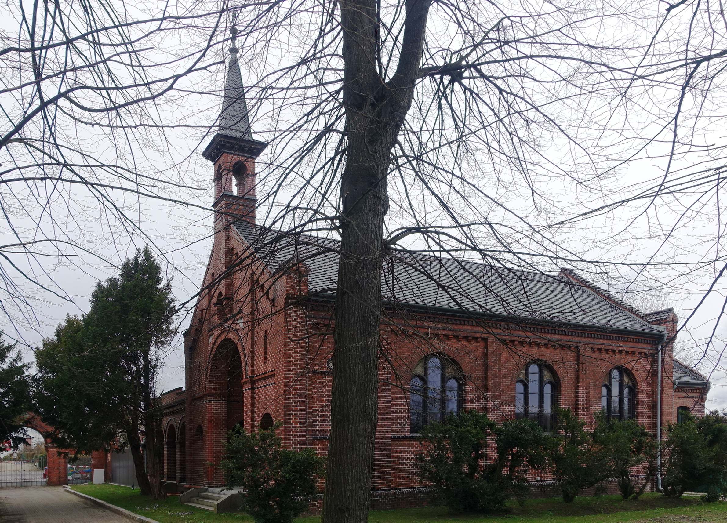 ehem. Friedhofskapelle